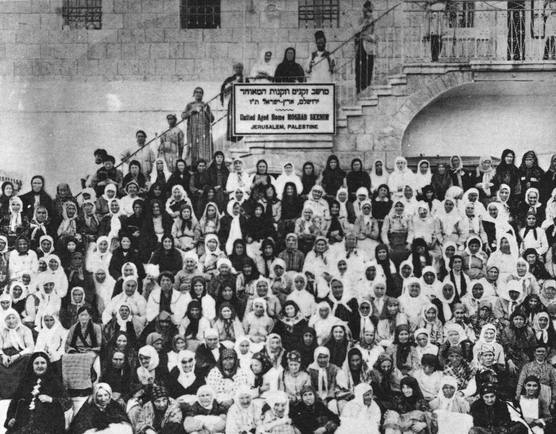 בית זקנים מאוחד